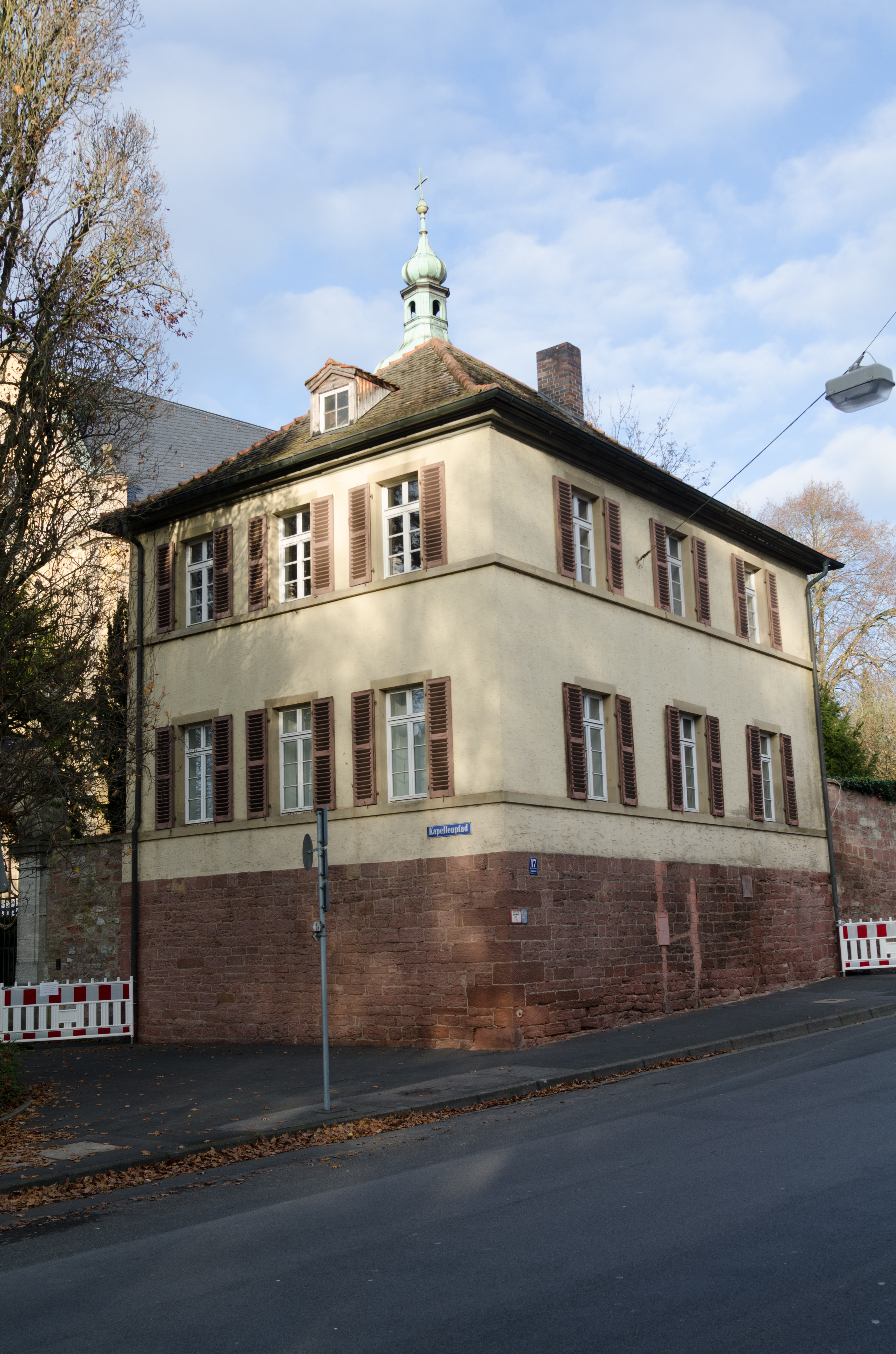 Kapellenstraße 17 in Bad Kissingen